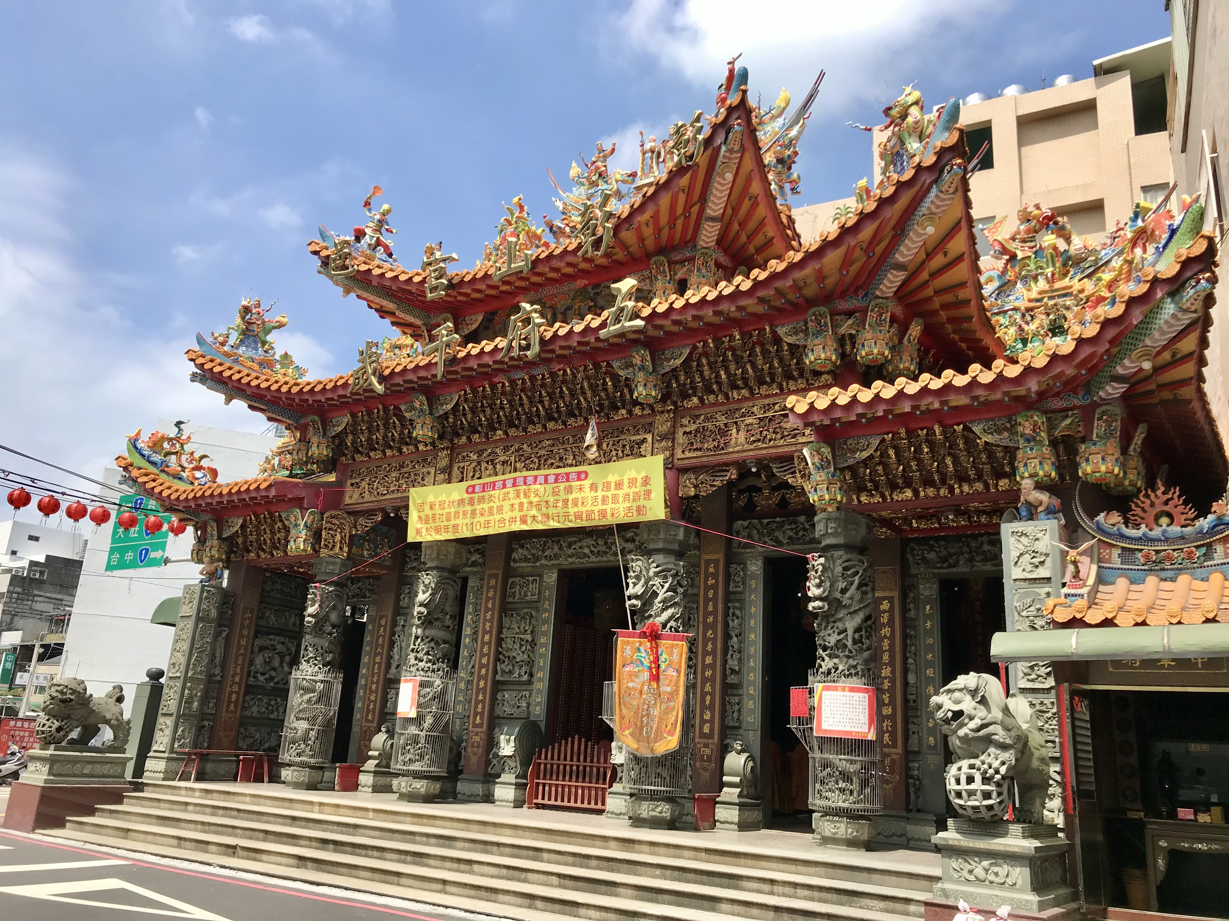 中文（台灣）: 彰山宮斜照